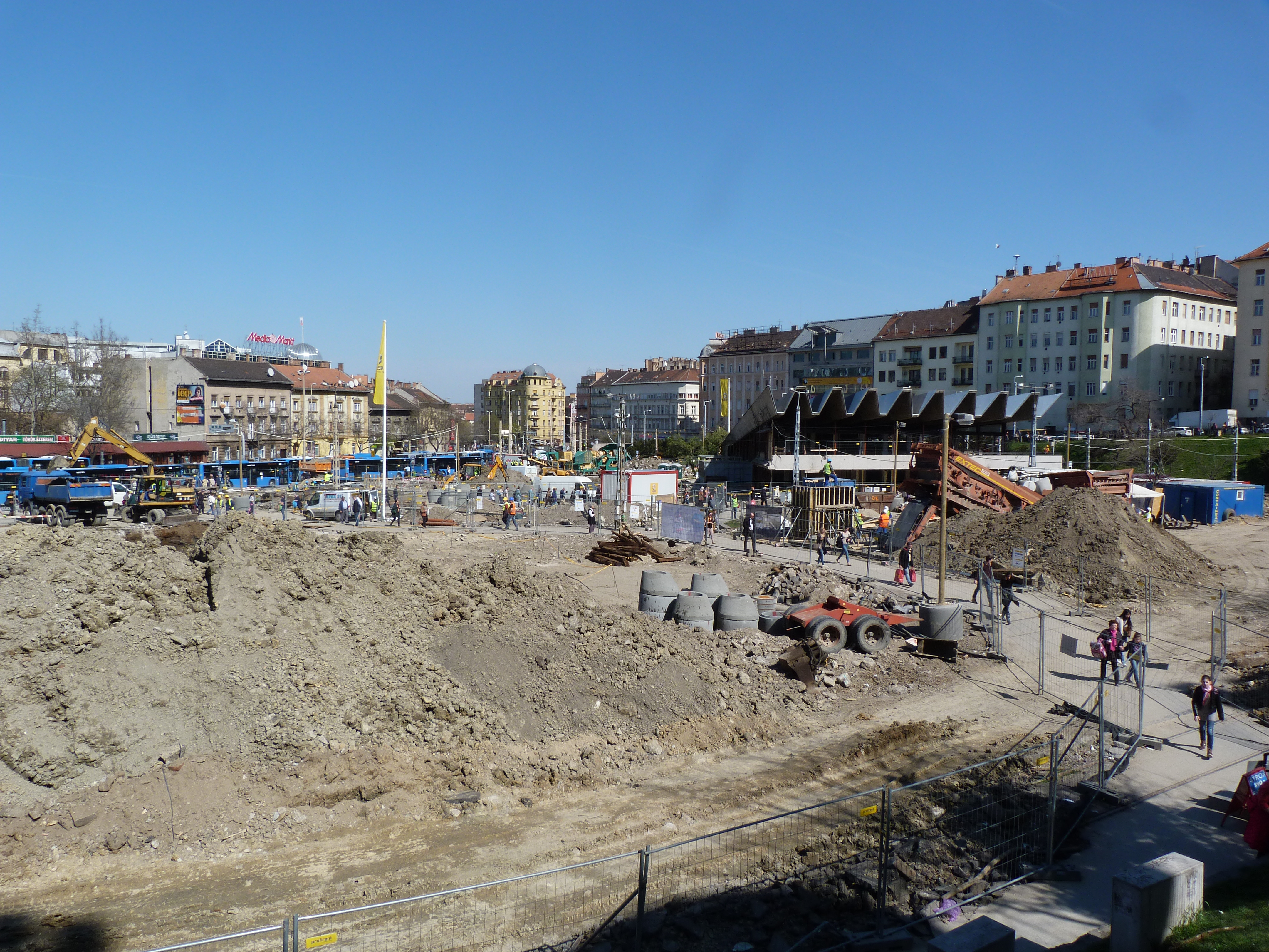 A felvétel 2015. április 10-én készült Budapesten, a Széll Kálmán téren. ©© Derzsi Elekes Andor, Budapest, 2015, A fénykép másolását és felhasználását a szerző ellenérték nélkül megengedi. Az engedély kiterjed a kereskedelmi célú hasznosításra is. Kéri azonban nevének feltüntetését a felhasználás során. A Metapolisz sorozat valamennyi képe és filmje Creative Commons alatti. kereskedelmi - for profit - célra is felhasználható. Ajánlott hivatkozás: Derzsi Elekes Andor: Metapolisz DVD line